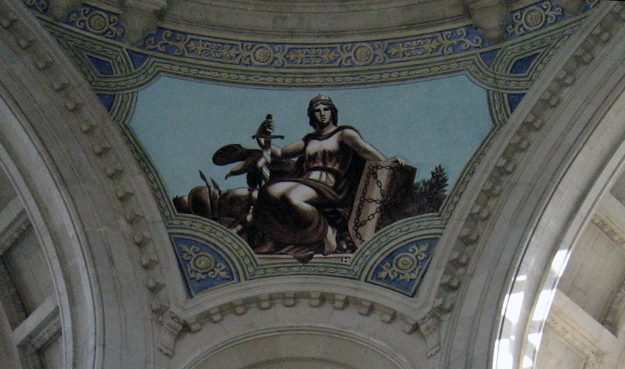 Grisalle representando el reino de Navarra por Manuel Humbert en la parte interior de la cúpula del Palacio Nacional de Barcelona, Cataluña